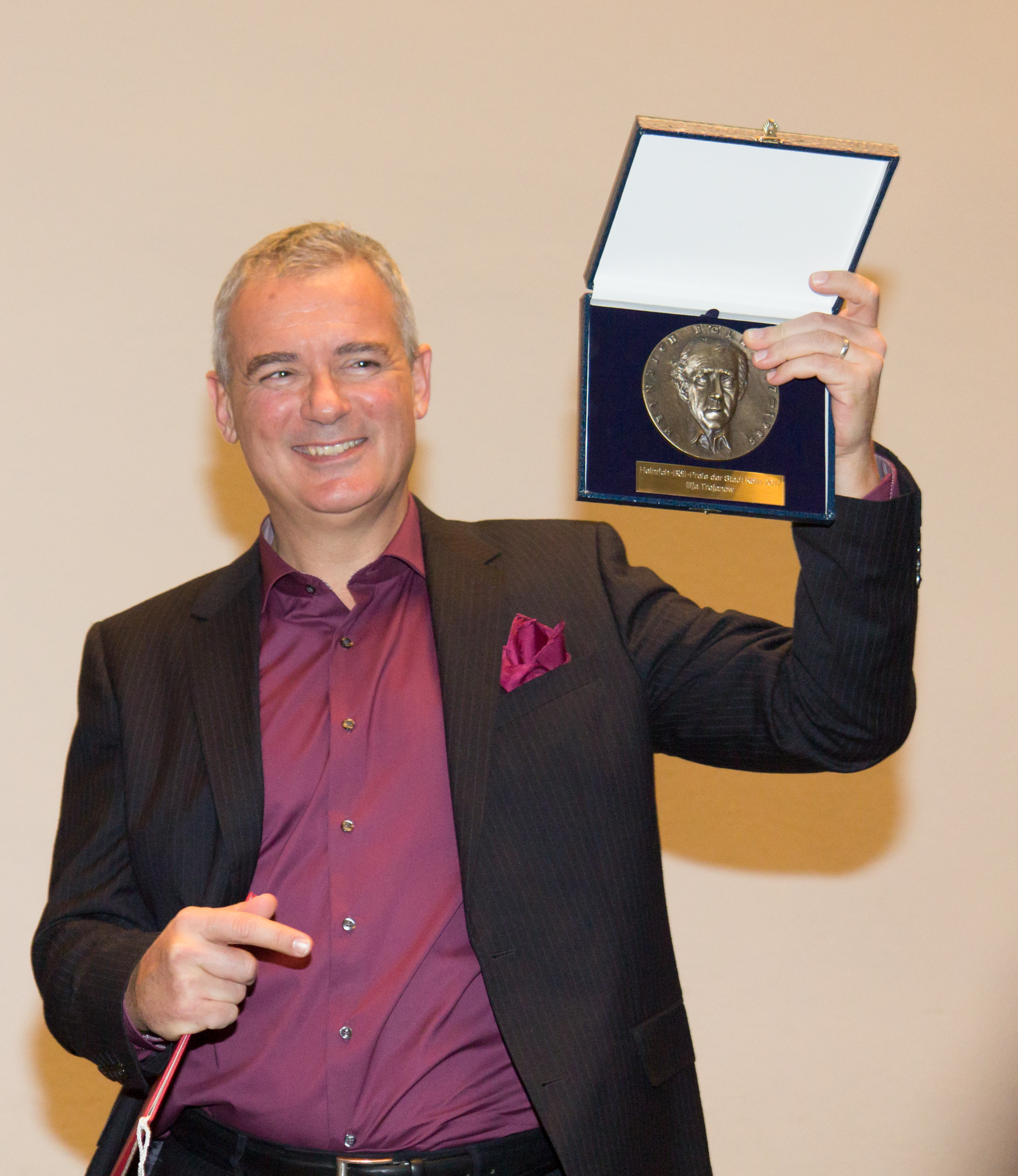 Ilija Trojanow erhält den Heinrich-Böll-Preis der Stadt Köln Oberbürgermeisterin Henriette Reker empfängt den Preisträger im Rathaus